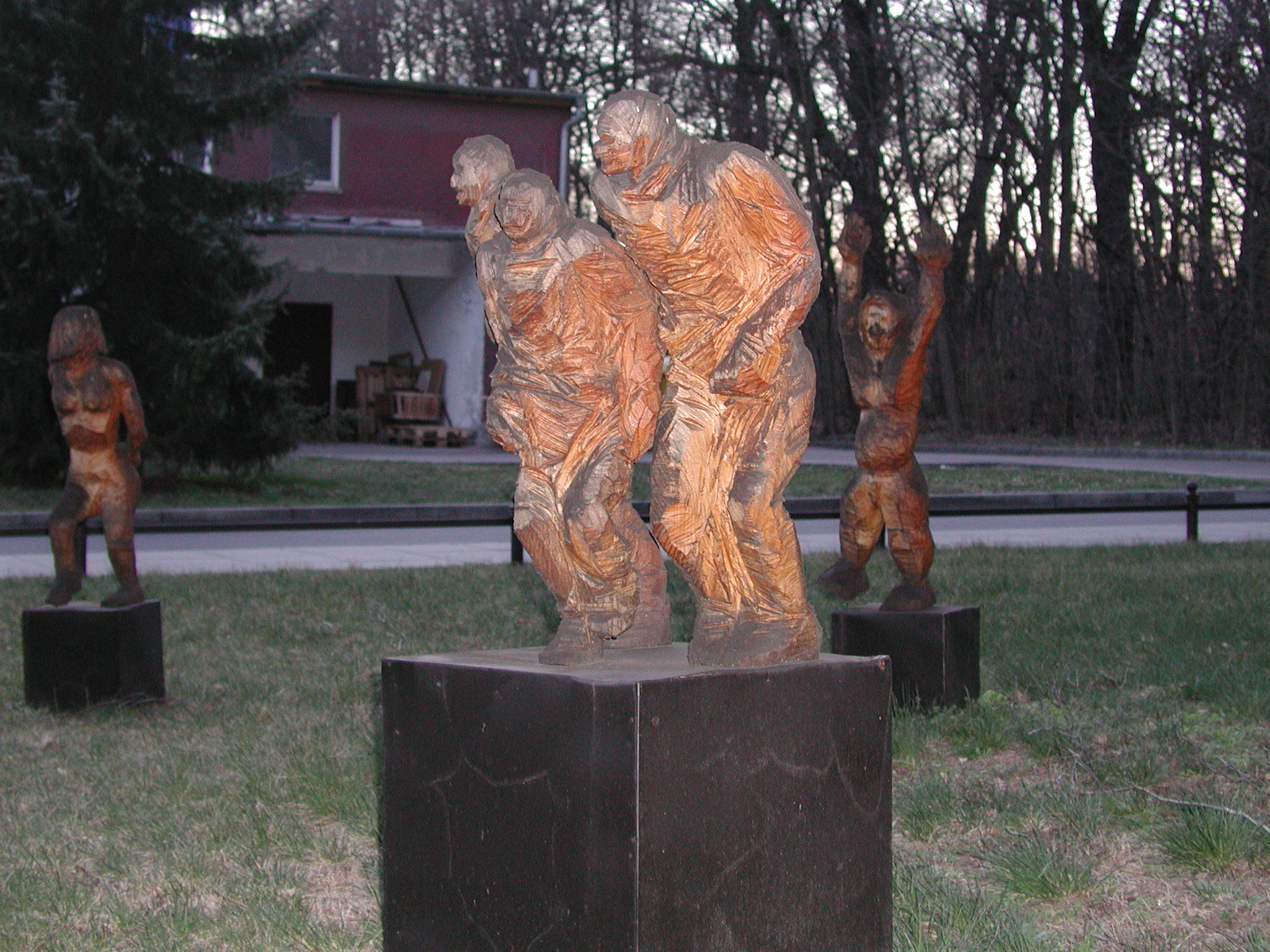 Kunst im KEH (12)